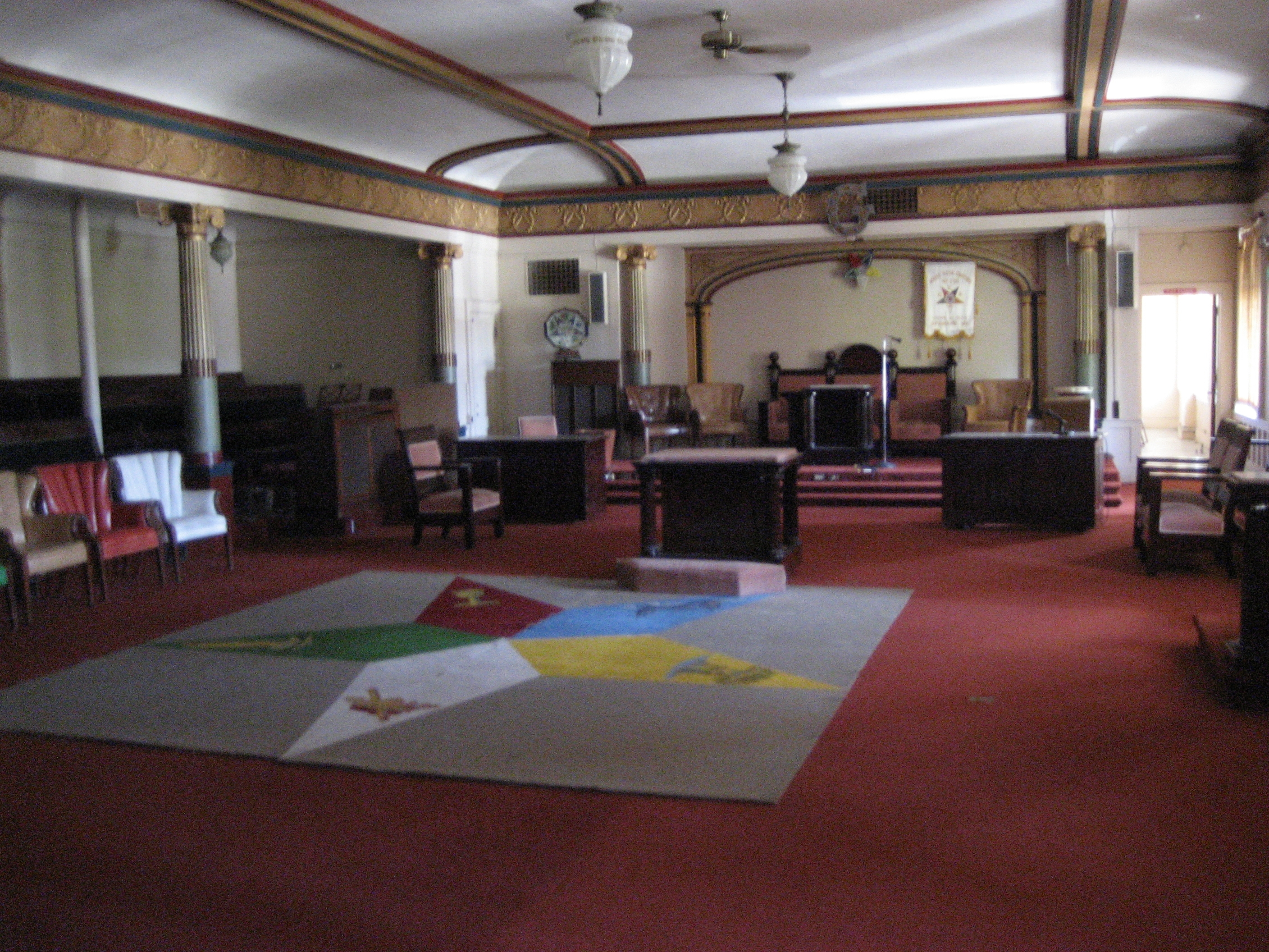 Une loge Eastern Star (Spokane, WA) organisation fraternelle para-maçonnique.